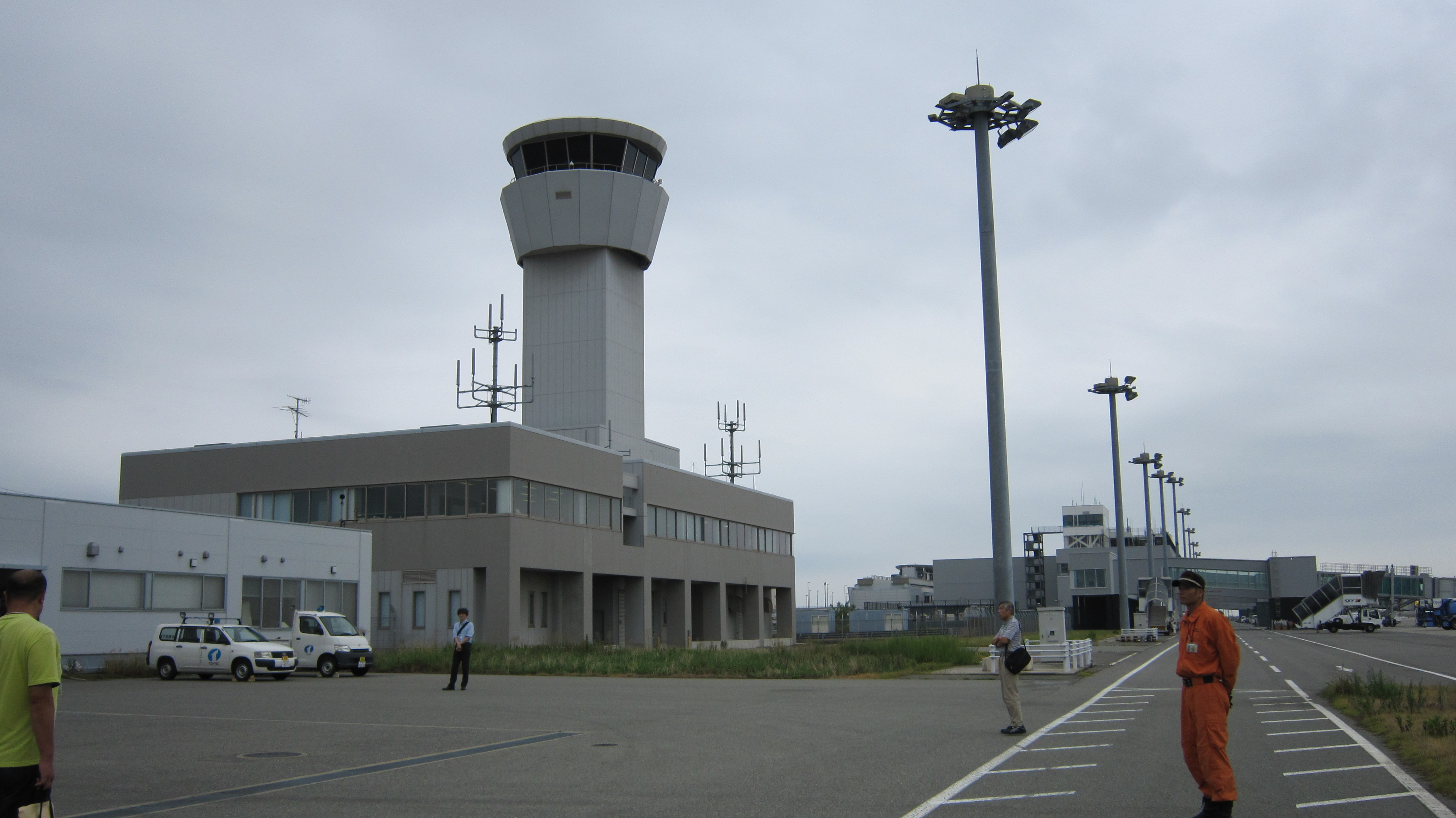 Marine Air / 神戸空港 ― 管制塔